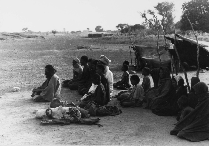 Het rituele gebed binnen de Islam wordt salat genoemd. Het zonsondergang of avondgebed, de maghrib, is het vierde gebed van de dag. In totaal zijn Moslims verplicht vijf dagelijkse gebeden te verrichten. De heer Broekhuijse heeft het gehele gebed op foto vastgelegd, de juiste volgorde waarop de foto's bezien moeten worden is: 20010324, 20010323, 20010321, 20010320 en 20010322.